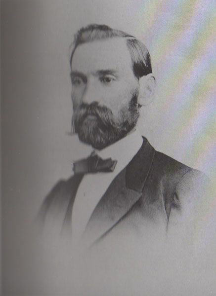 Ђорђе Ценић, правник (1825-1903)